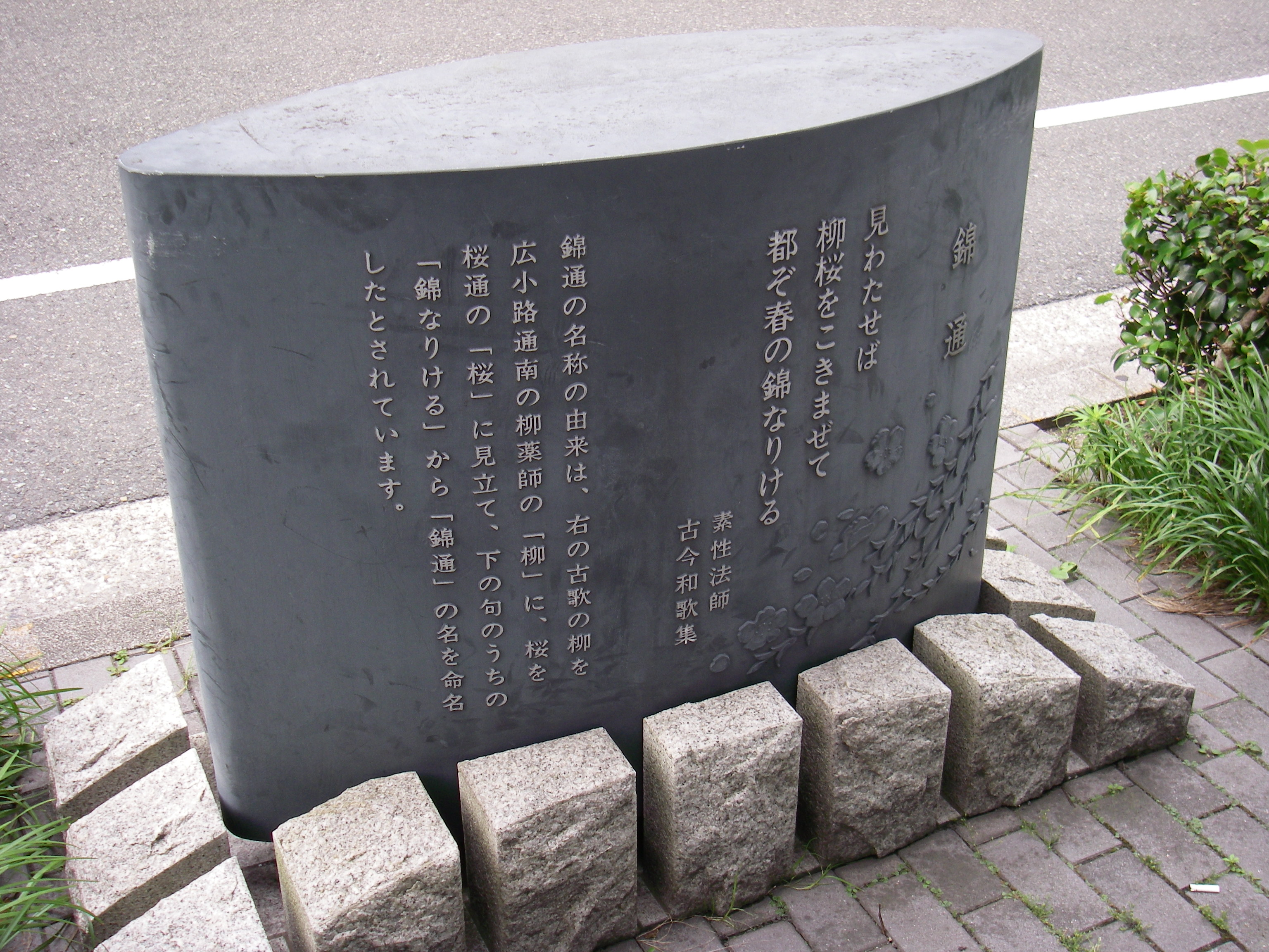 名古屋市の錦通、中区錦一丁目東松錦ビル・NEC中部ビル前の名前の由来の碑